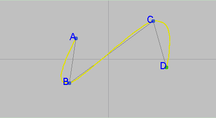 C1 interpolacni krivka